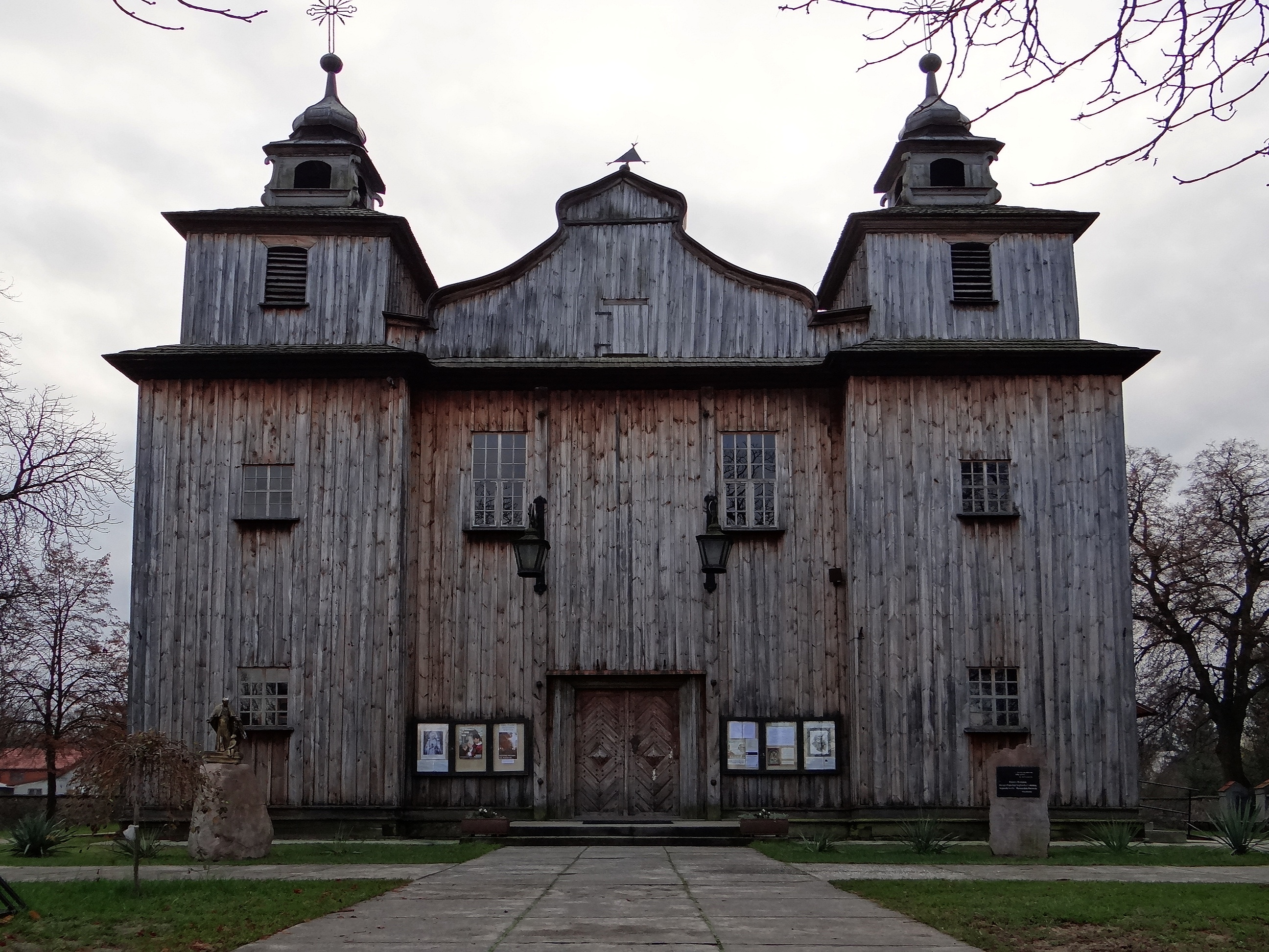 Mariańskie Porzecze - zespół klasztorny marianów ( XIX w.): kościół p.w. MB Bolesnej